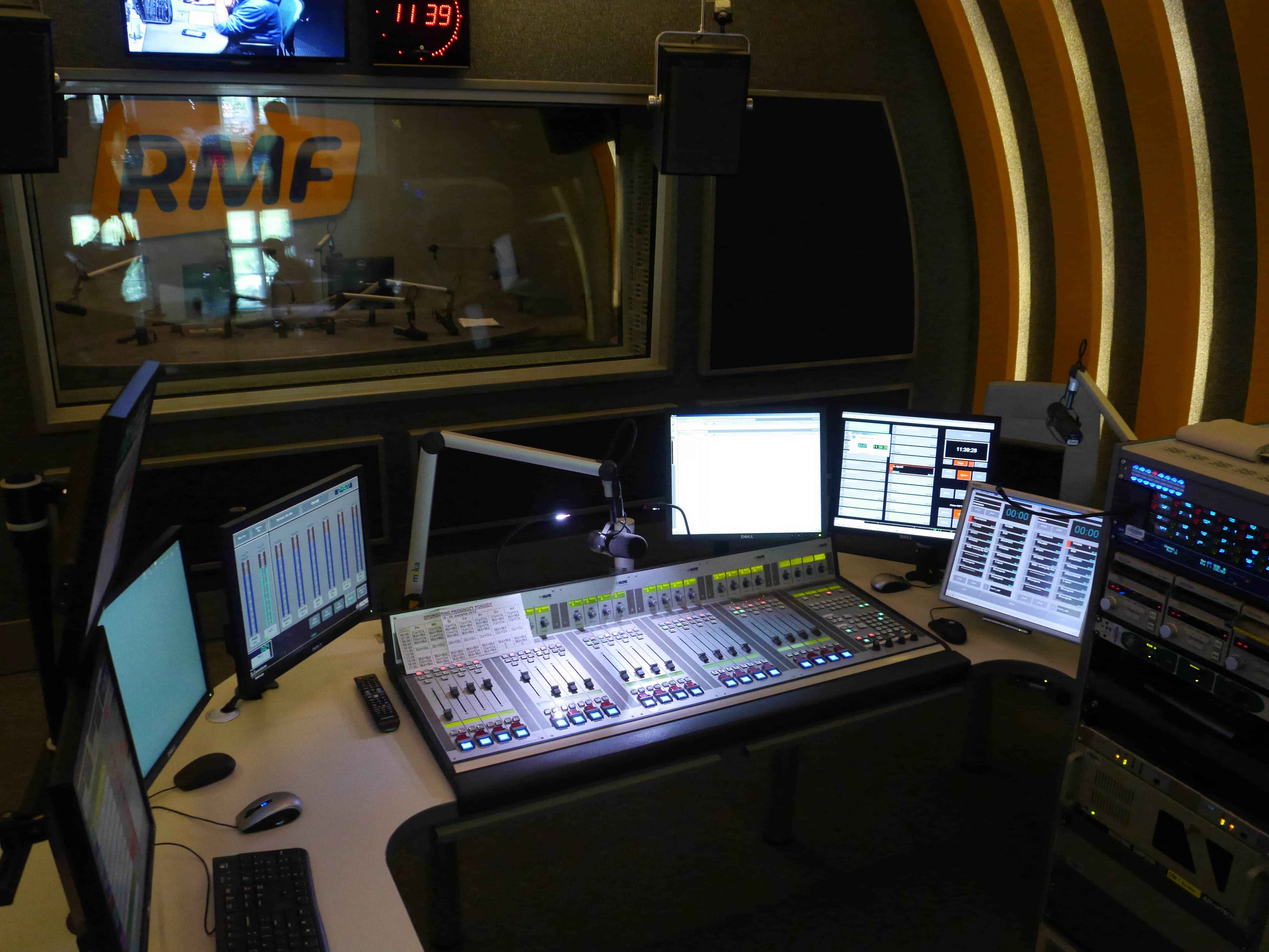 Siedziba radia RMF FM, al. Waszyngtona 1, 30-204 Kraków This photo was taken with Panasonic Lumix DMC-GH3 camera, thanks to Panasonic. You can see all photographs in category: Taken with Panasonic Lumix DMC-GH3.